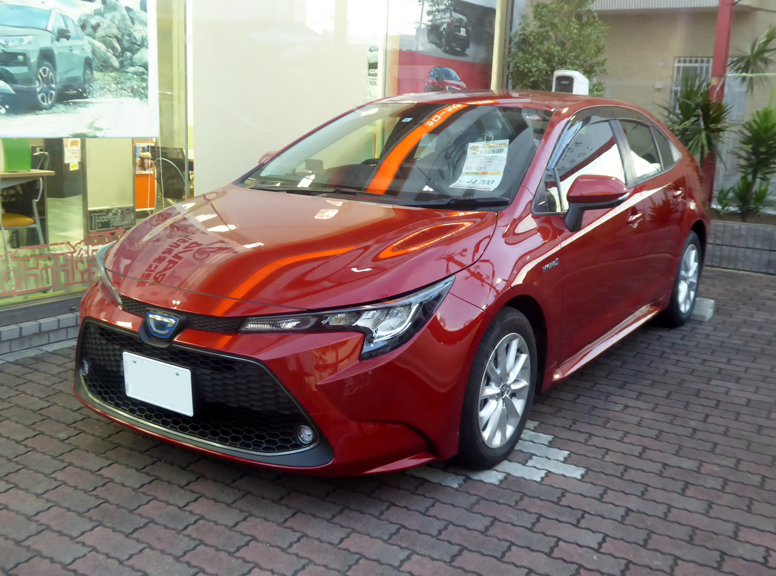 6AA-ZWE211-AEXEB型トヨタ・カローラHYBRID S 2WDをフロントから撮影。